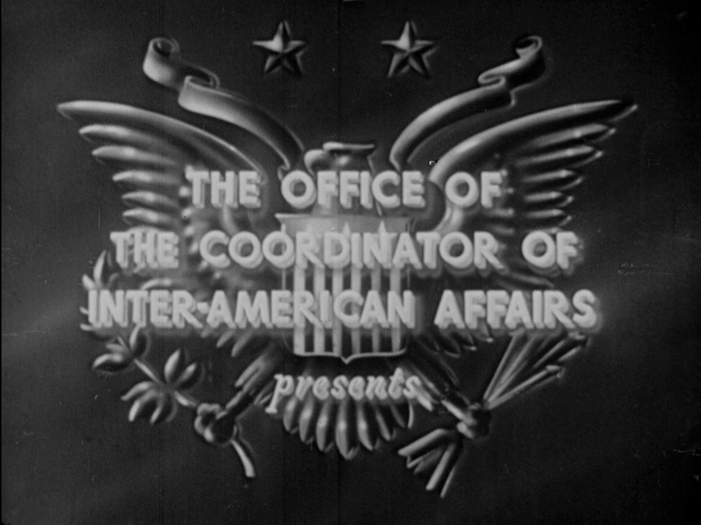 Office of the Coordinator of Inter-American Affairs